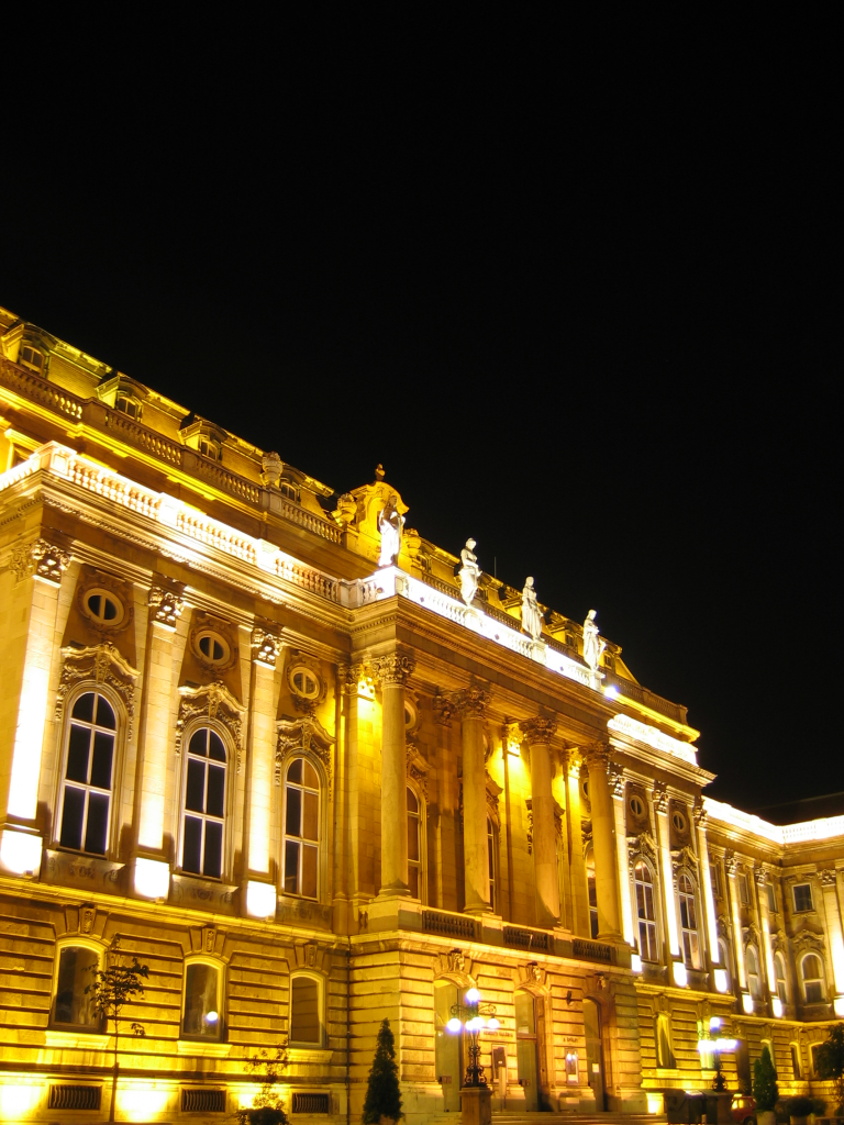 Budapest - Budai Várpalota éjjel